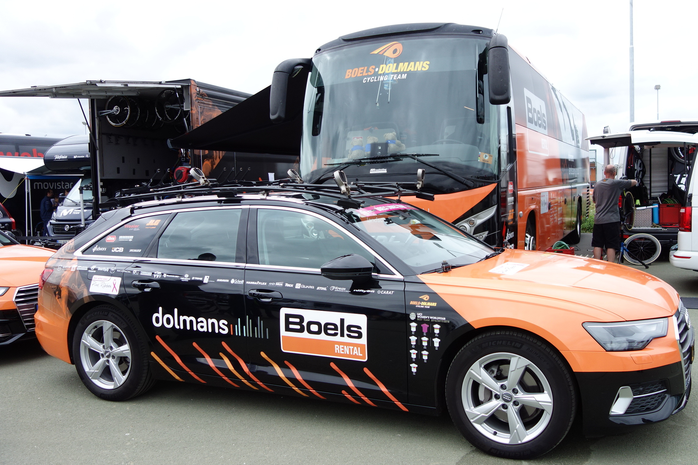 Auto en bus van Boels Dolmans bij de proloog op het Tom Dumoulin Bike Park in Sittard in de Boels Ladies Tour 2019